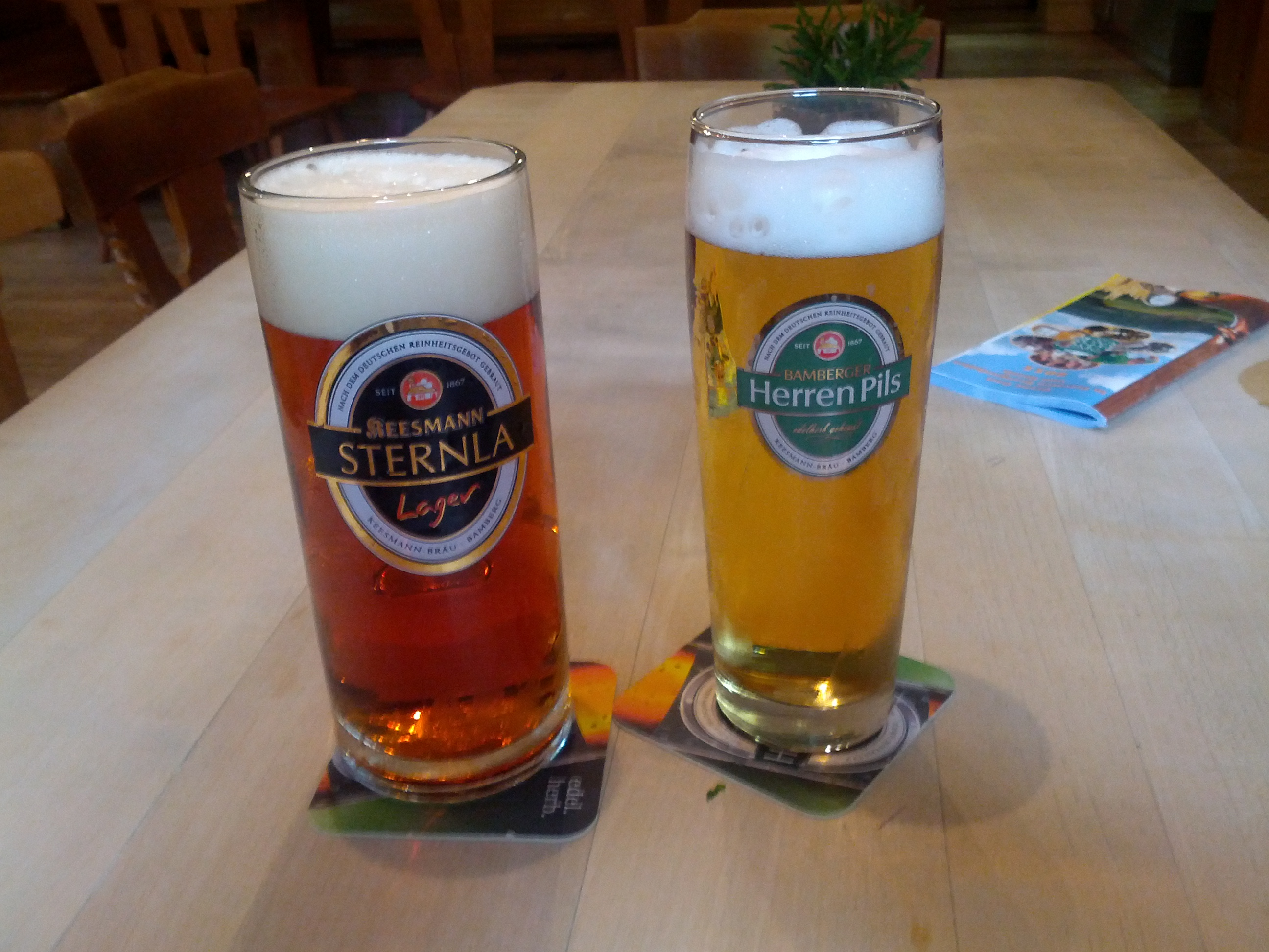 Bier der Bamberger Brauerei Keesmann